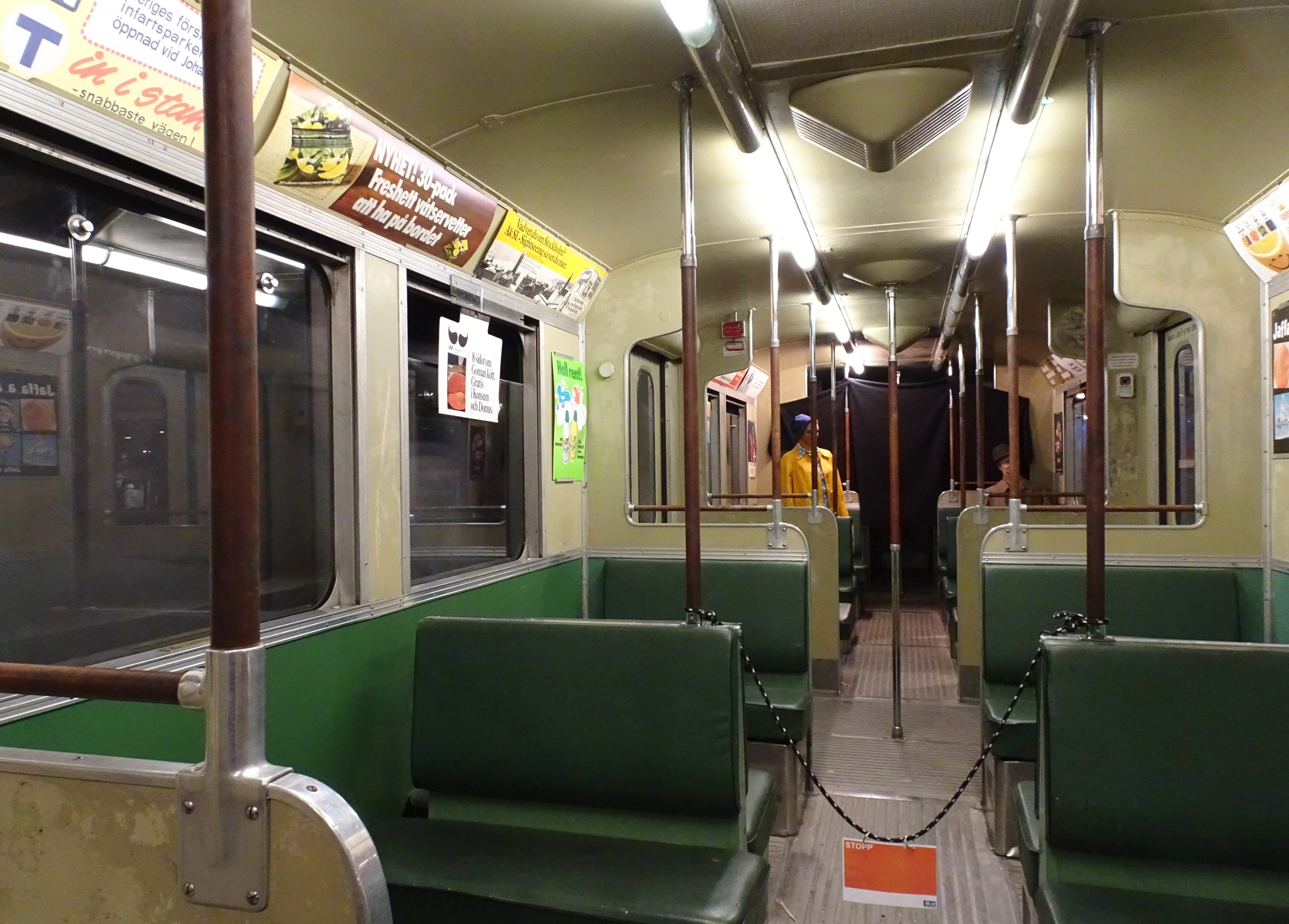 Spårvägsmuseet, tunnelbanevagn C2, grön interiör